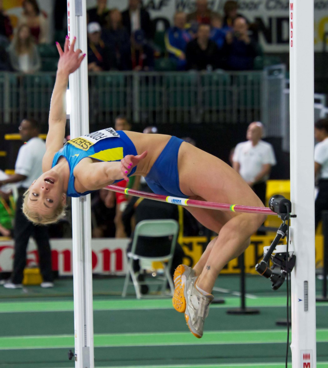 Alina Fyodorova